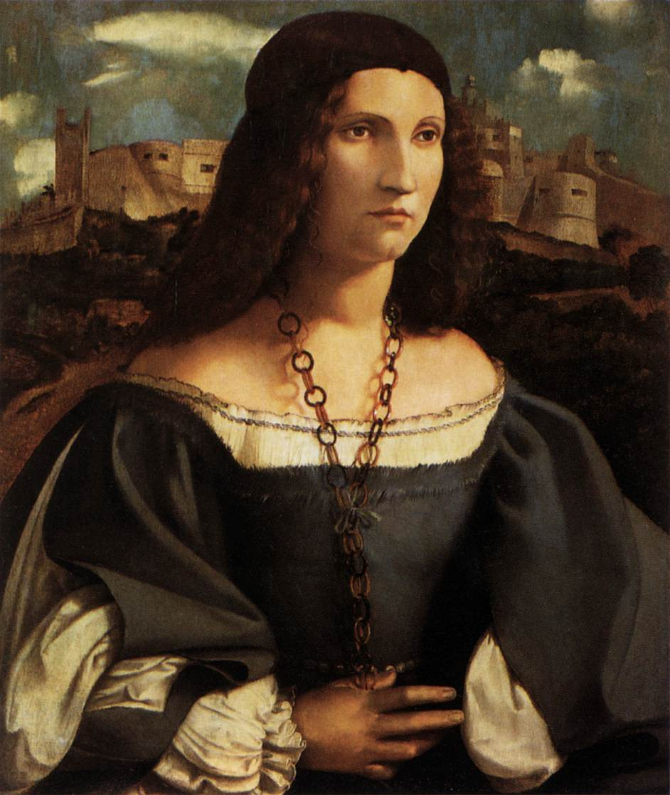 née Pio da Carpi